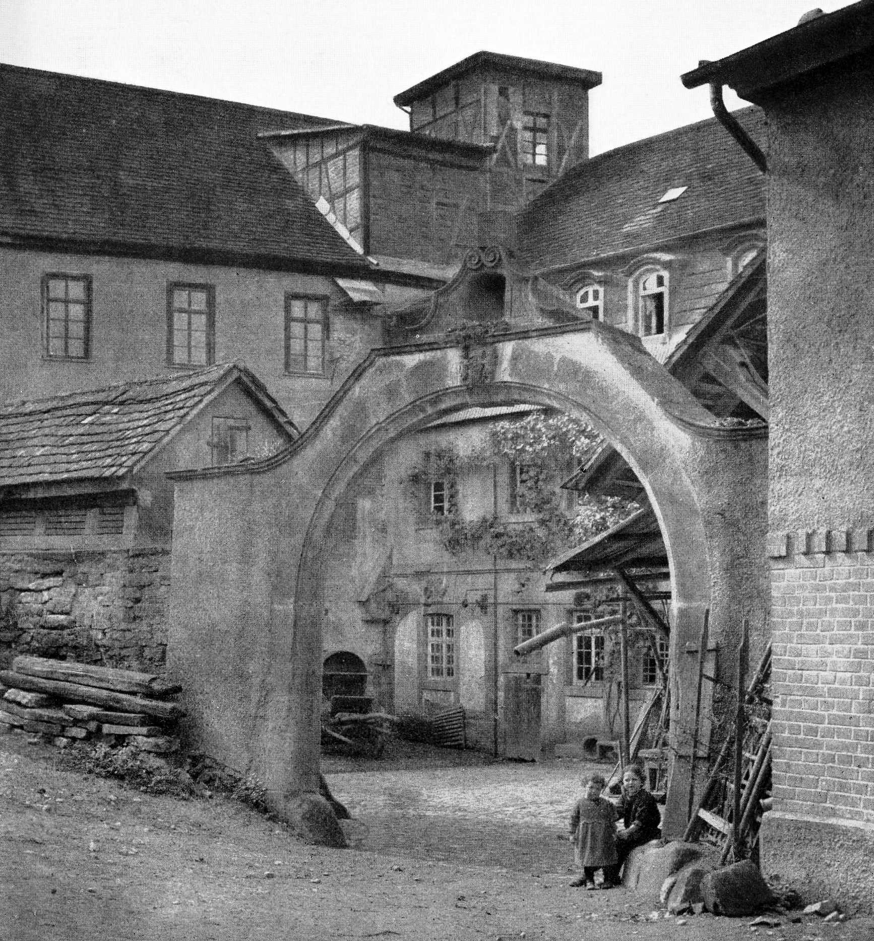 Die Rahmer-Mühle in Heilbronn-Sontheim